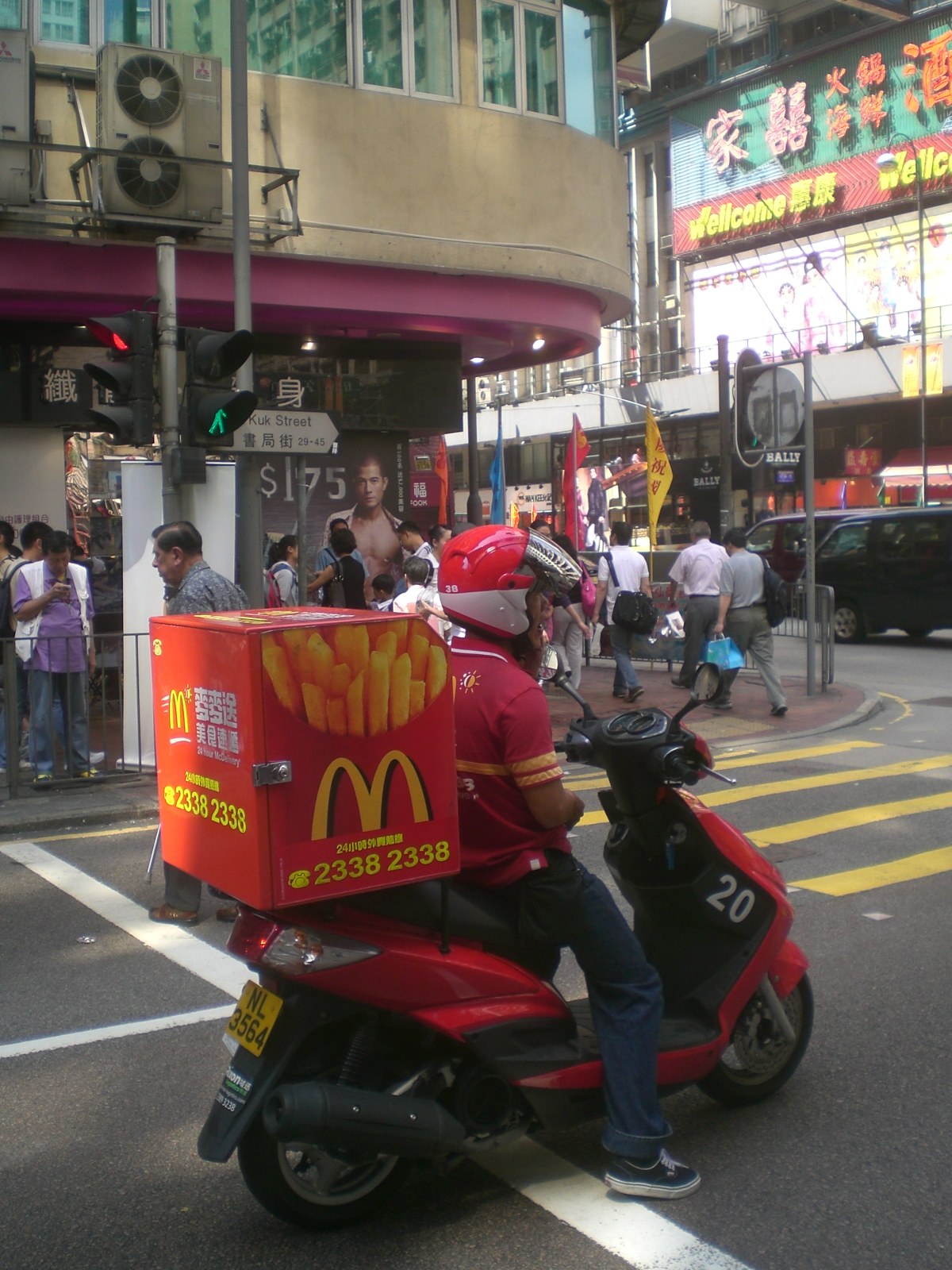 麥麥送外賣電單車在北角書局街